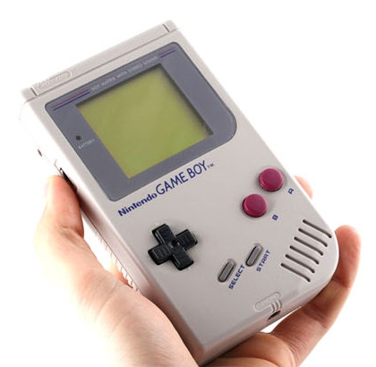 Nintendo Gameboy